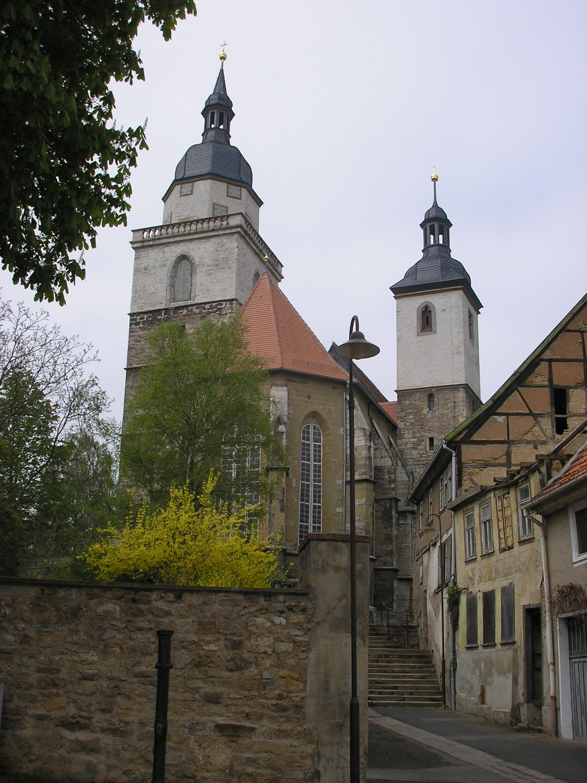 Ostansicht der Stadtkirche in Bad Tennstedt (Thüringen).